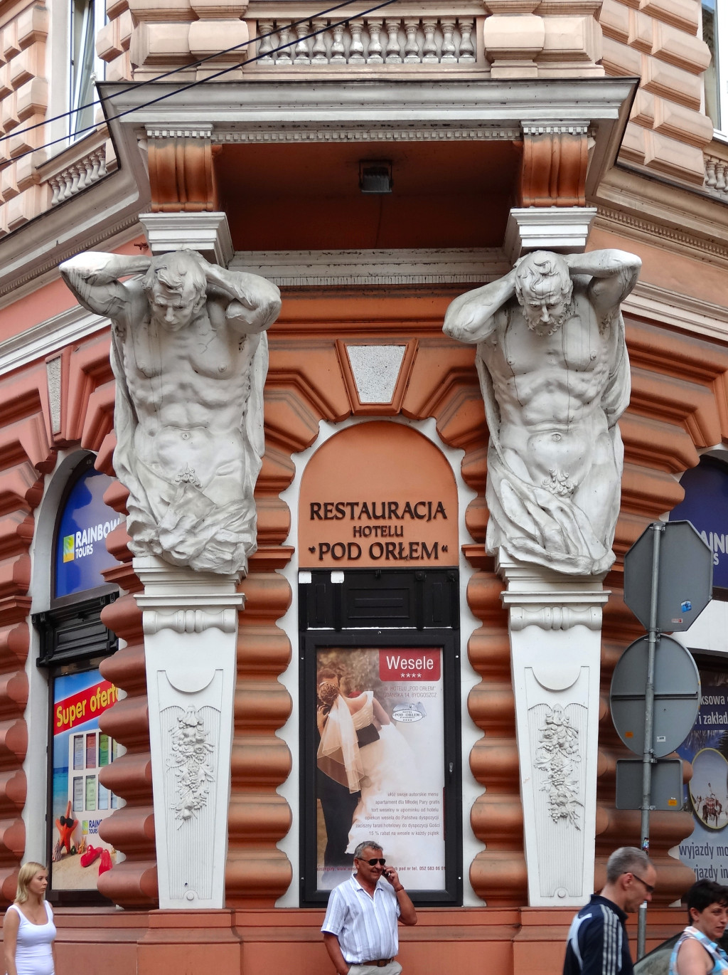 Hotel Pod Orłem w Bydgoszczy przy ul. Gdańskiej 14 (zbud. 1896, Józef Święcicki); na zdj. detale architektoniczne budynku